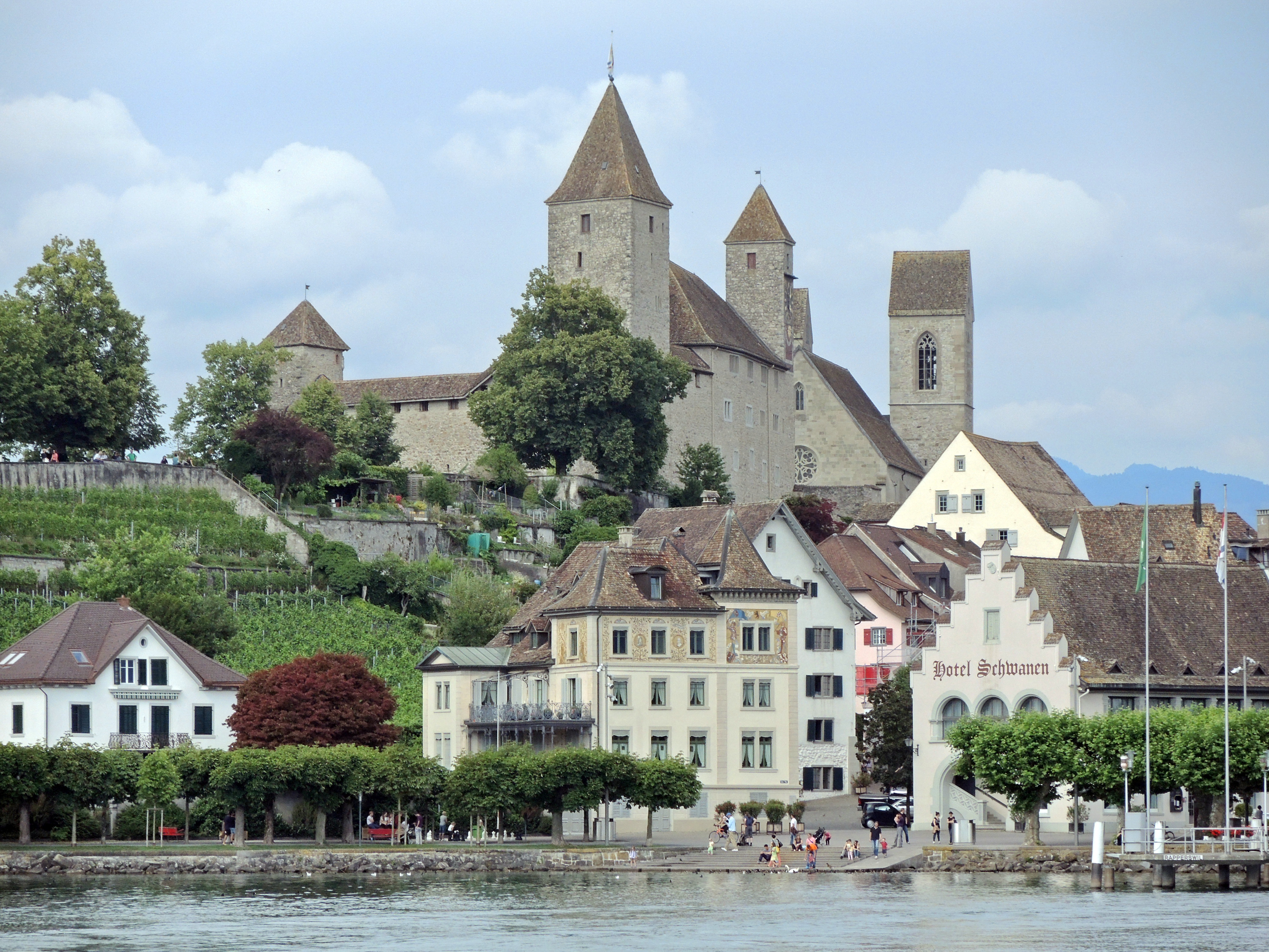 Endingerplatz in Rapperswil (Switzerland) : Curti-Haus, Haus Schlossberg, Hotel Schwanen, towers of Schloss Rapperswil and Stadtpfarrkirche Rapperswil in the background